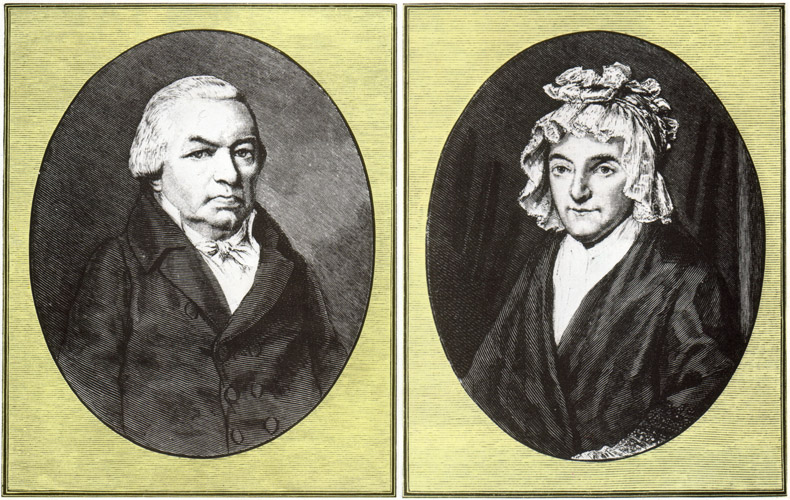 Ludwig van Beethoven's Parents, Johann van Beethoven and Maria Magdalena Keverich